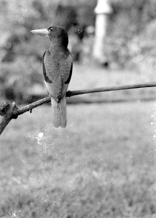 Negatief. Een jong volwassen ijsvogel (Halcyon cyanoventris) te Dampar, Oost-Java